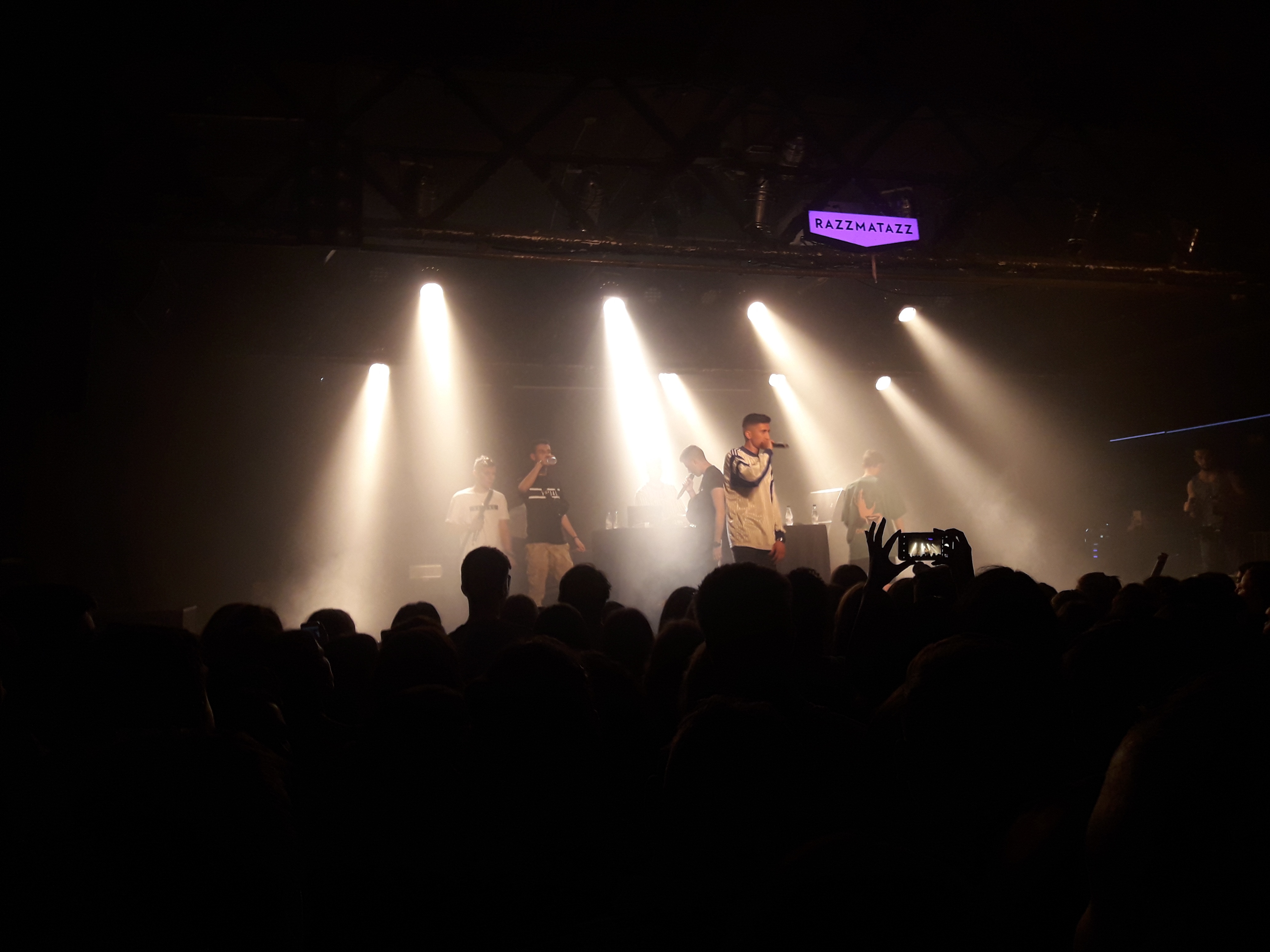 31 FAM actuant a la Sala Razzmatazz després de treure el seu àlbum TR3TZE